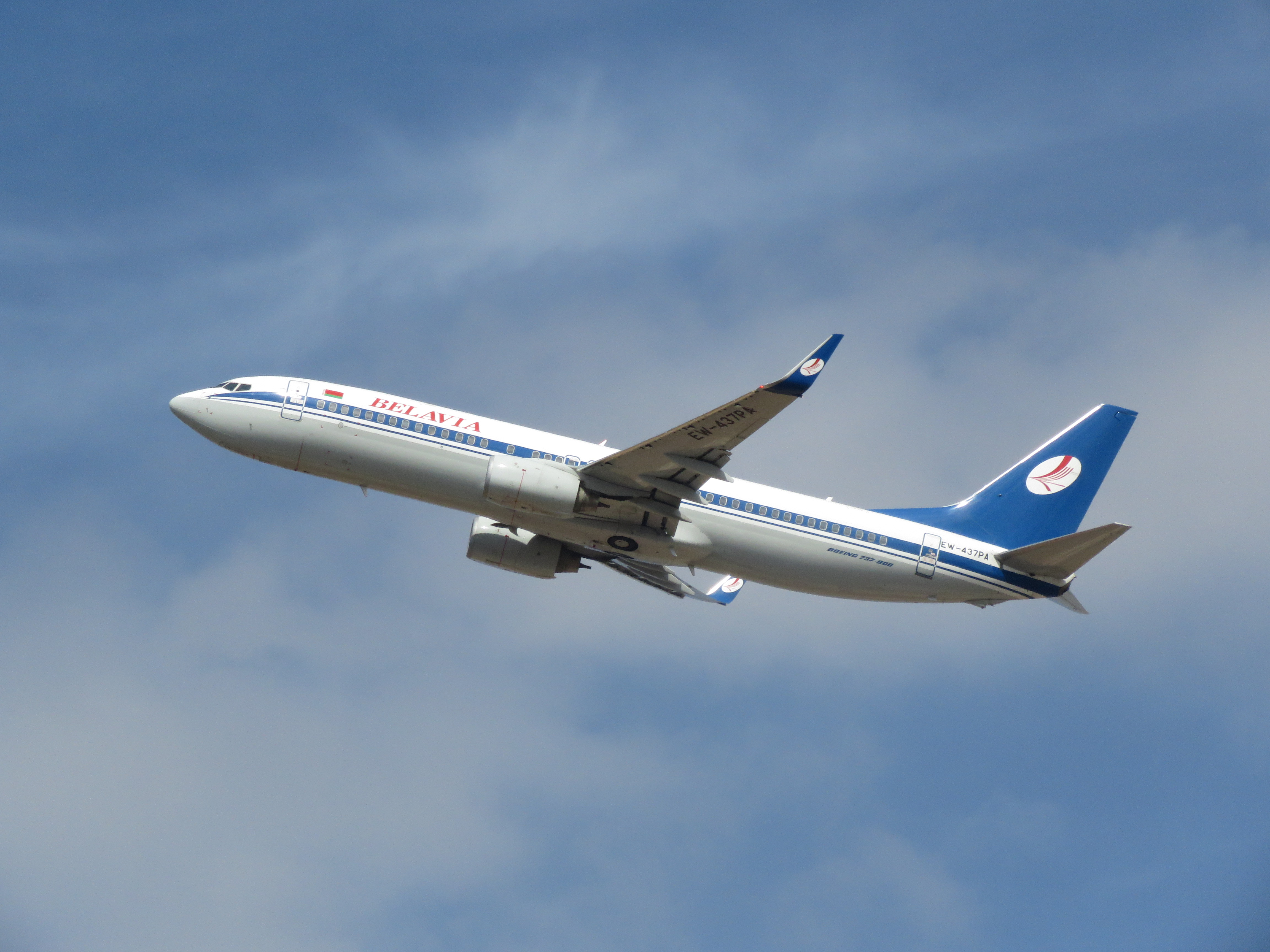 בואינג 737-800 של החברה מיד לאחר המראה מבן גוריון.